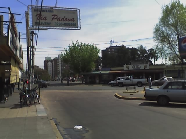 Avenida Noguera y Avenida Rivadavia, ciudad de Padua, provincia de Buenos Aires, Argentina.